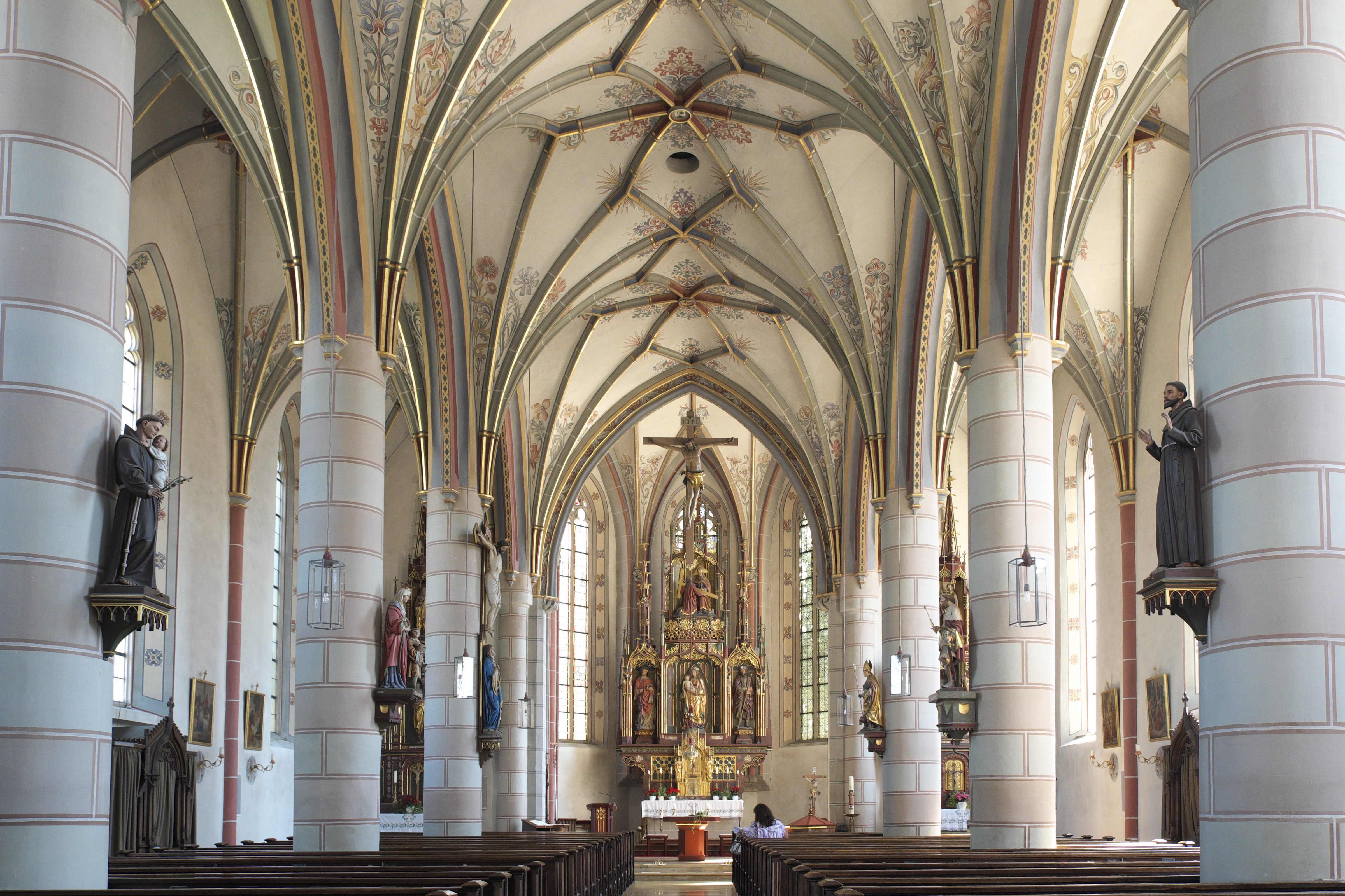 Katholische Pfarrkirche St. Laurentius in Obing im Landkreis Traunstein (Bayern/Deutschland), Innenraum